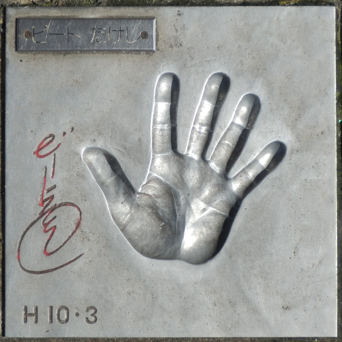 浅草公会堂（浅草オレンジ通り）「スターの手形」より